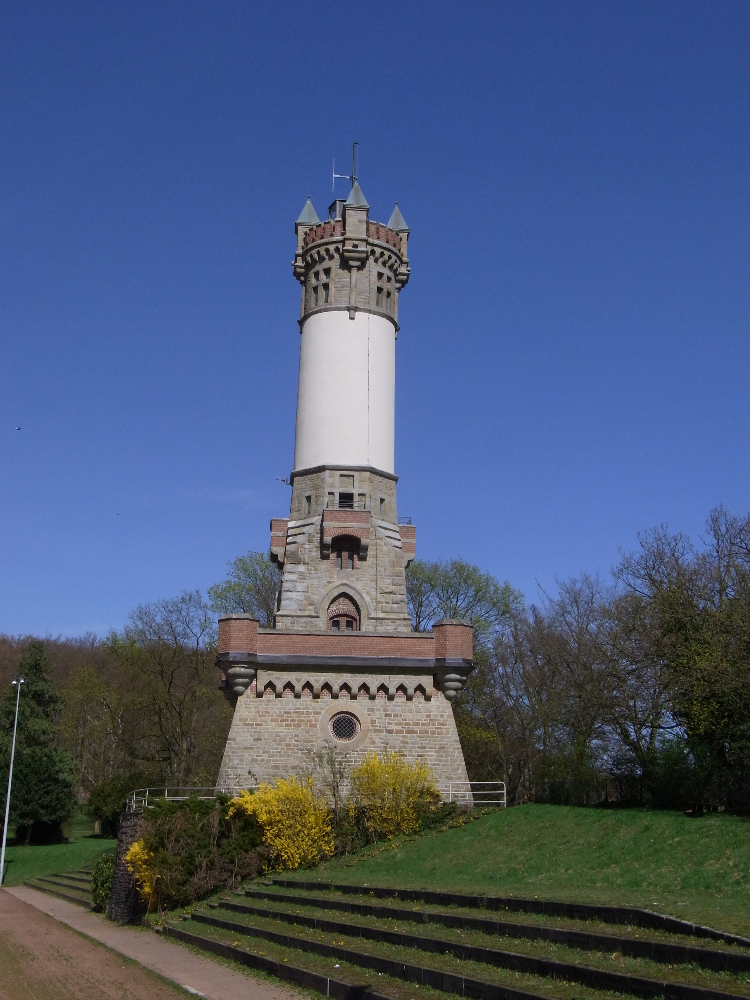 Harkortturm in Wetter (Ruhr)